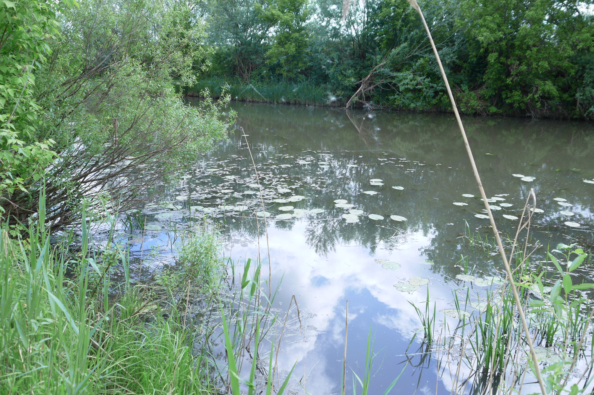 Река Ток